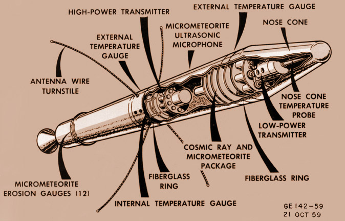 Explorer I satellite structure